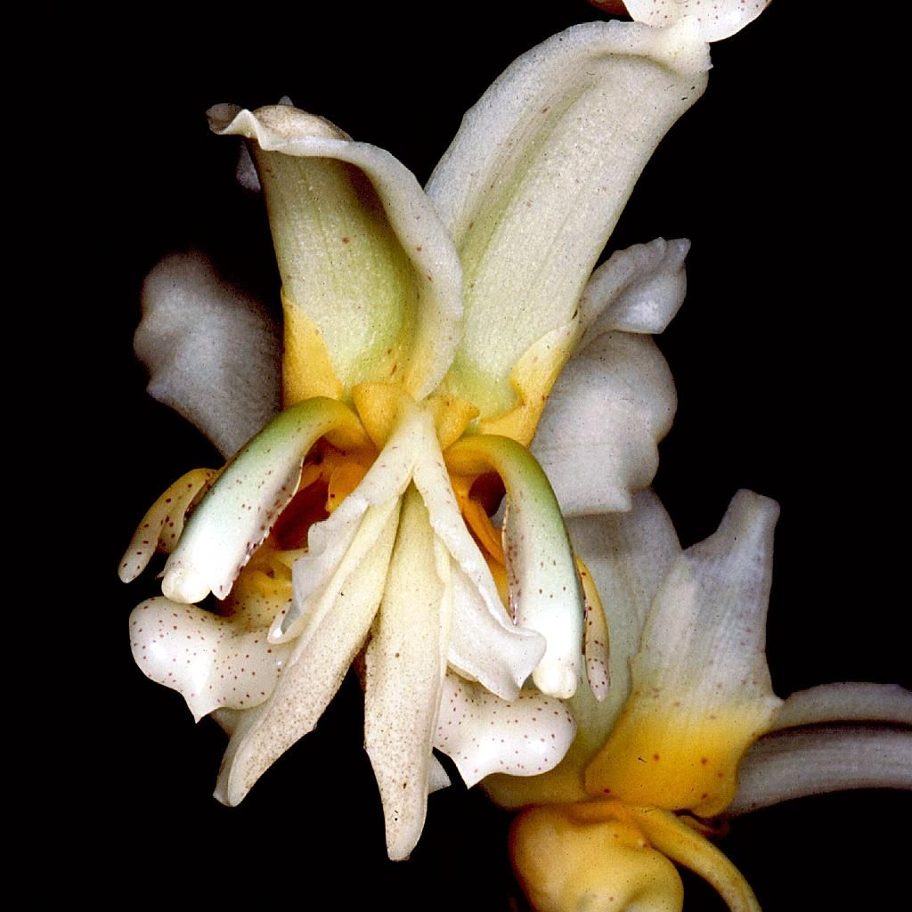 Stanhopea pseudoradiosa